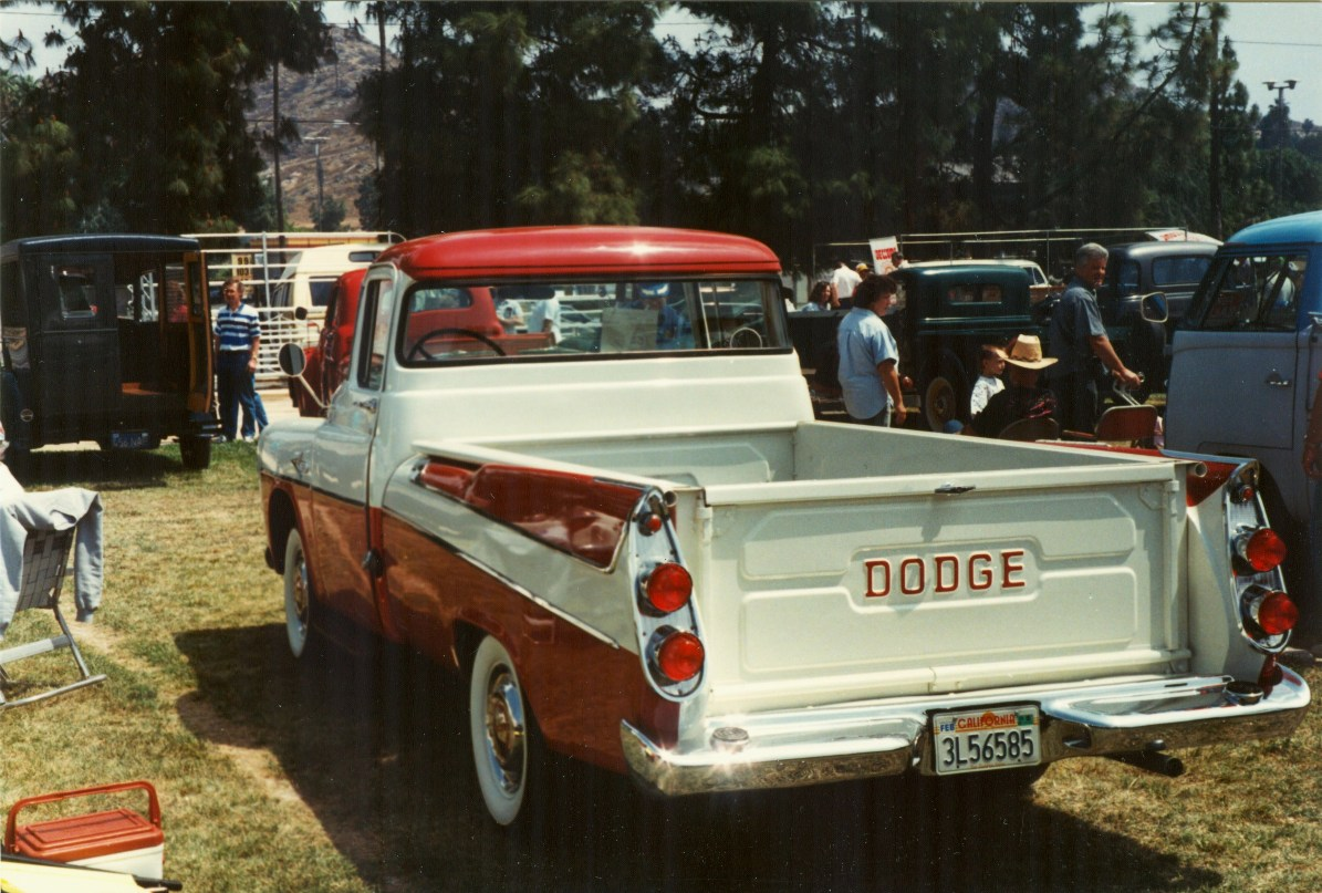 1957 Dodge Sweptside Pickup